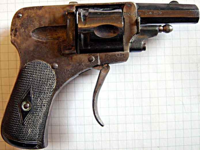 My Picture ( Lax) Calibre 6.35 fabriqué par Henrion Armand, Dassy T., Heuschen Victor. marque "HDH" déposé le 24 janvier 1912 devient la manufacture "HDH" S.A. en 1927 au 22 rue Cherry à Liège (Belgique) certains modèles sont commercialés par la Manufacture française d'armes et cycles de Saint-Étienne sous le nom de bossu. Sorte de compromis entre le revolver et le pistolet automatique ce revolver de type bossu ne possède pas une détente fixe comme celui vendu par la manufacture. Conçu pour limiter les risques d'accrochage dans les plis des vêtements : le chien percuteur est caréné, le cran d'arrête est sur le flan gauche, la queue de détente est repliable.